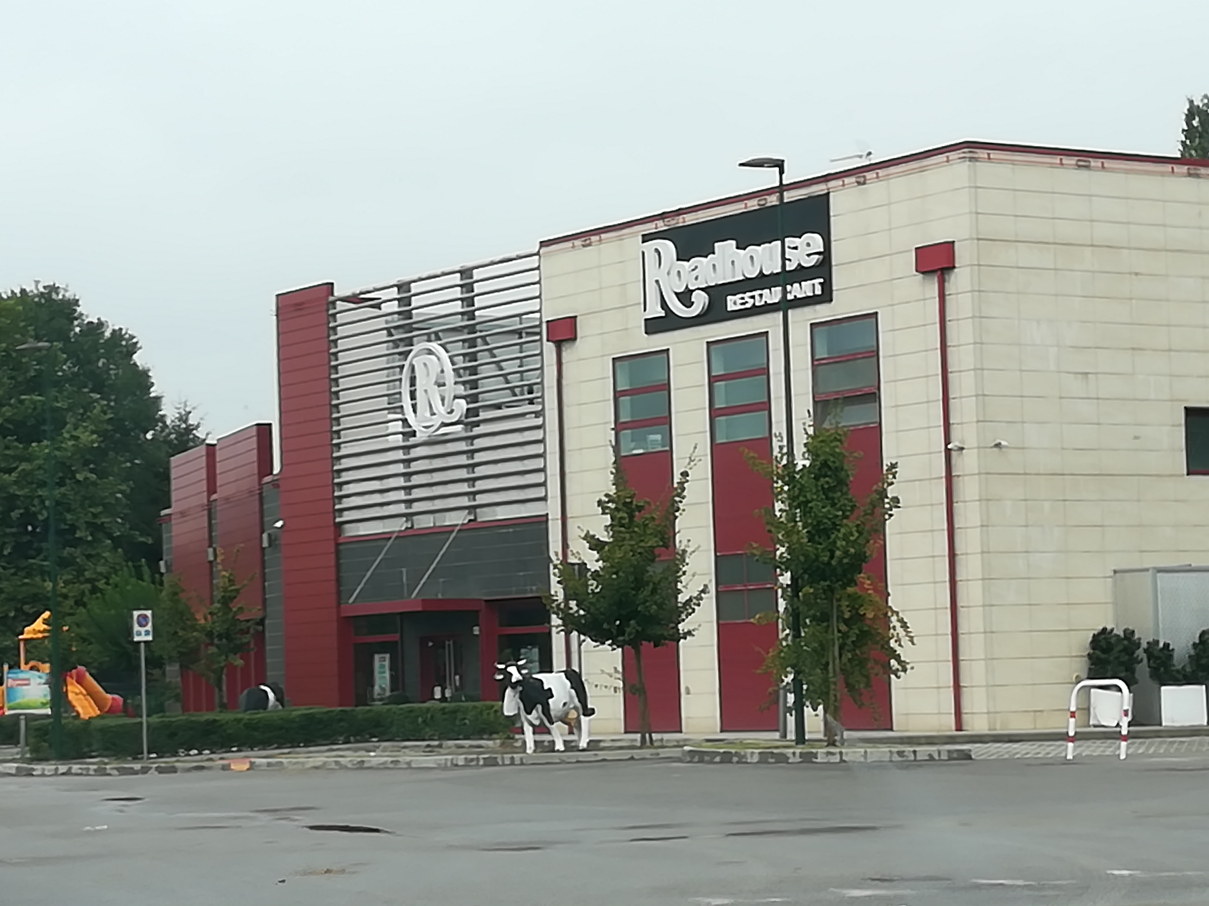 Frazione di Mestre (Venezia).